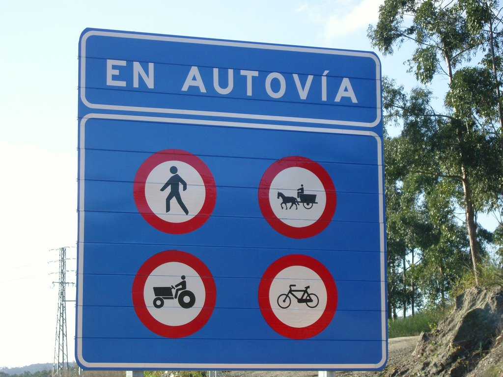 Xa saben, nada de peóns, nin carromatos, nin chimpíns, nin bicicletas!